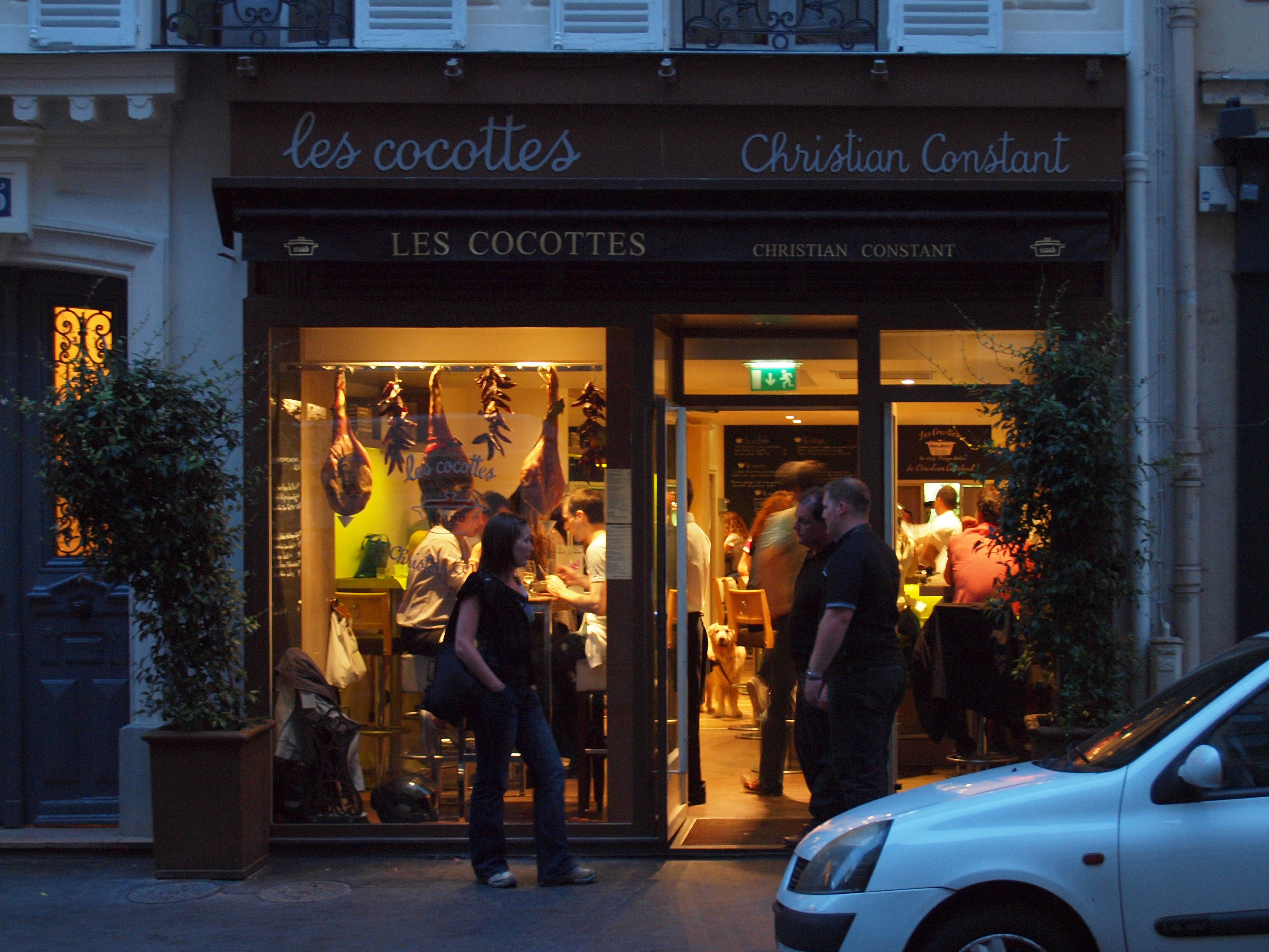 Les Cocottes de Christian Constant, 135 Rue Saint-Dominique, 75007 Paris, France